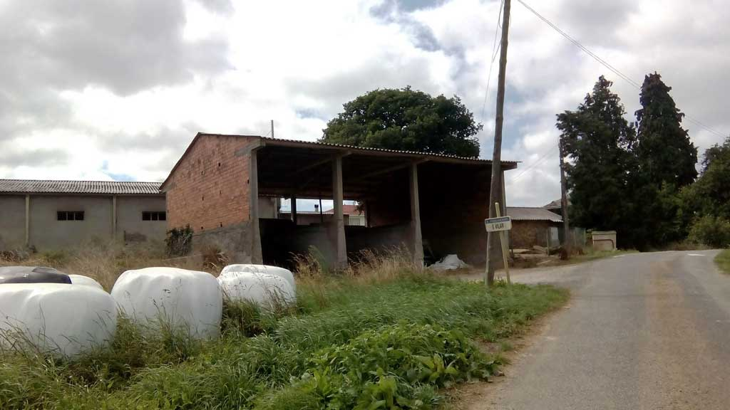 Vista do Vilar, Curtis.